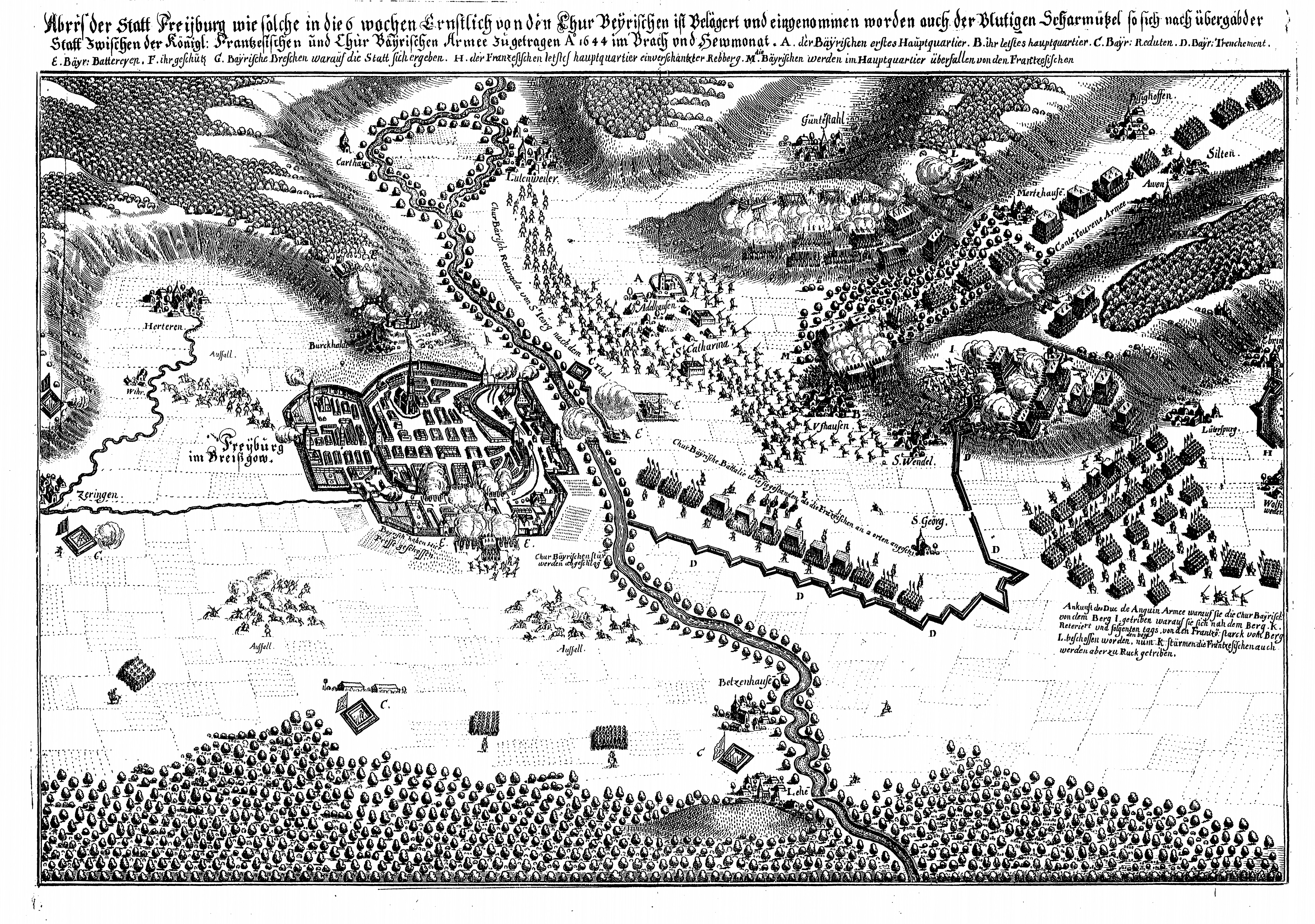 Nachweis der Ortschaft Lehen in einer Karte aus dem Theatrum Europaeum, oder außführliche und warhafftige Beschreibung aller und jeder denckwürdiger Geschichten, so sich hin und wieder in der Welt, fürnemblich aber in Europa und Teutschlanden, sowol im Religion- als Prophan-Wesen, Fünffter Theil, Das ist ... vom Jahr 1643 biß in gegenwärtiges 1647. Jahr